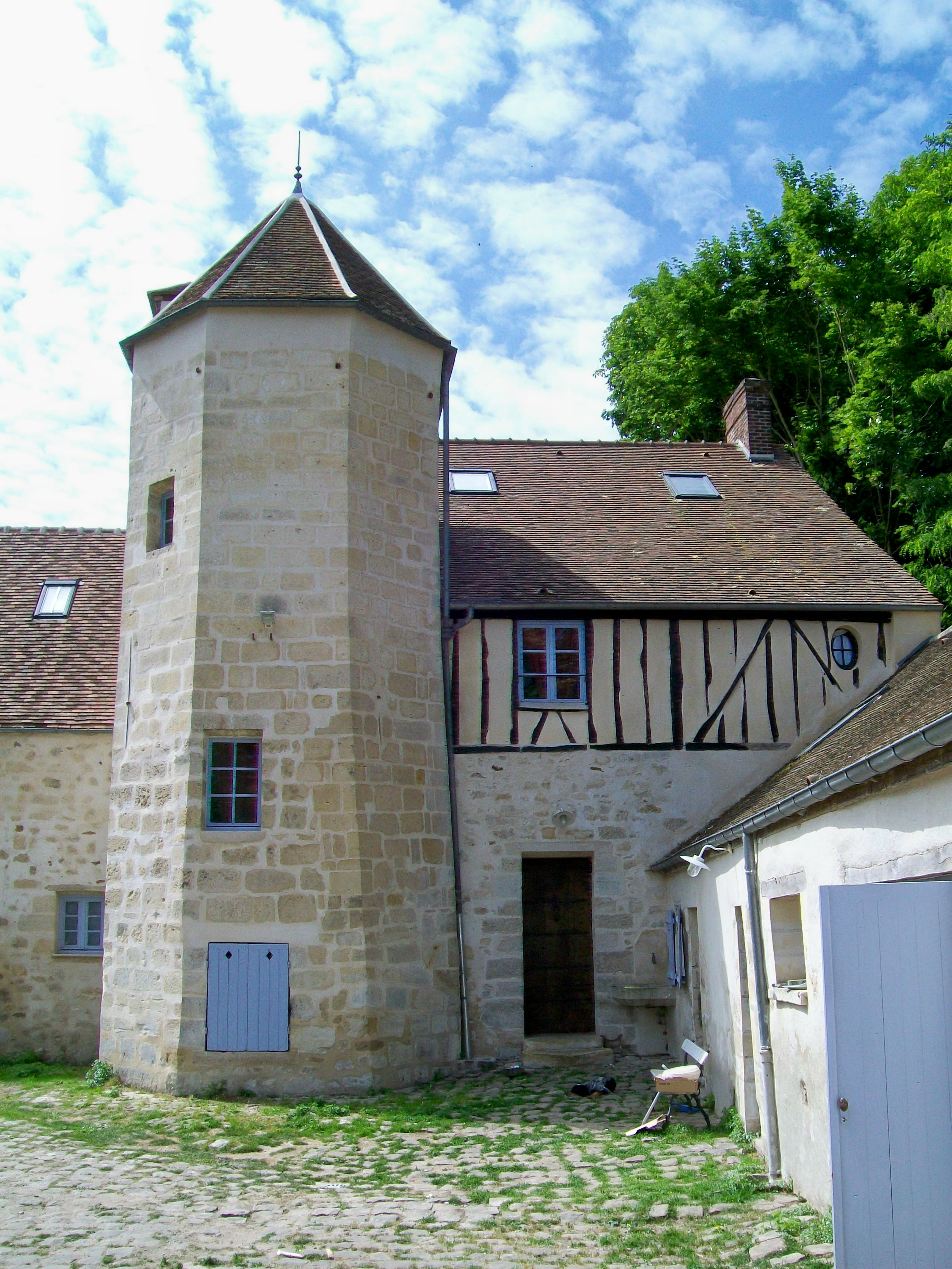 L'ancien hôtel seigneurial « Petit Royaumont » sur la Grande-Rue, récemment restauré. Son nom renvoie à son ancien propriétaire, l'abbaye de Royaumont.